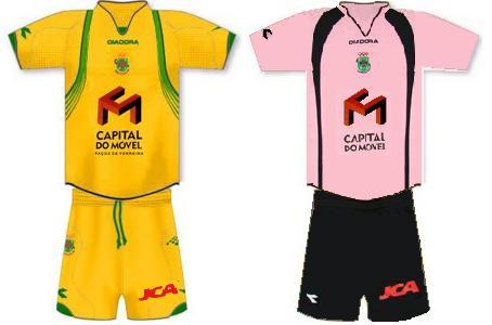 Equipamentos do F.C. Paços de Ferreira